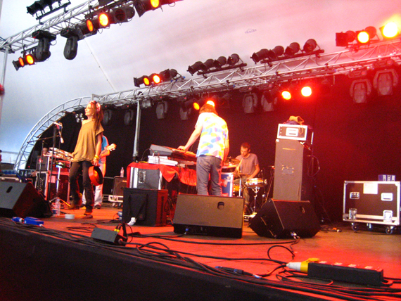 Gang Gang Dance live 2006